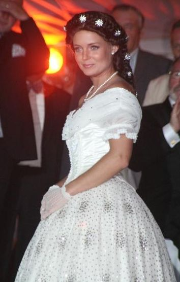 Tamee Harrison als Sissi bei "der Nacht der Kaiser" am 18.08.2007 in Bad Ischl. Welturaufführung aus dem Musical: SISSI - THE LOVESTORY.